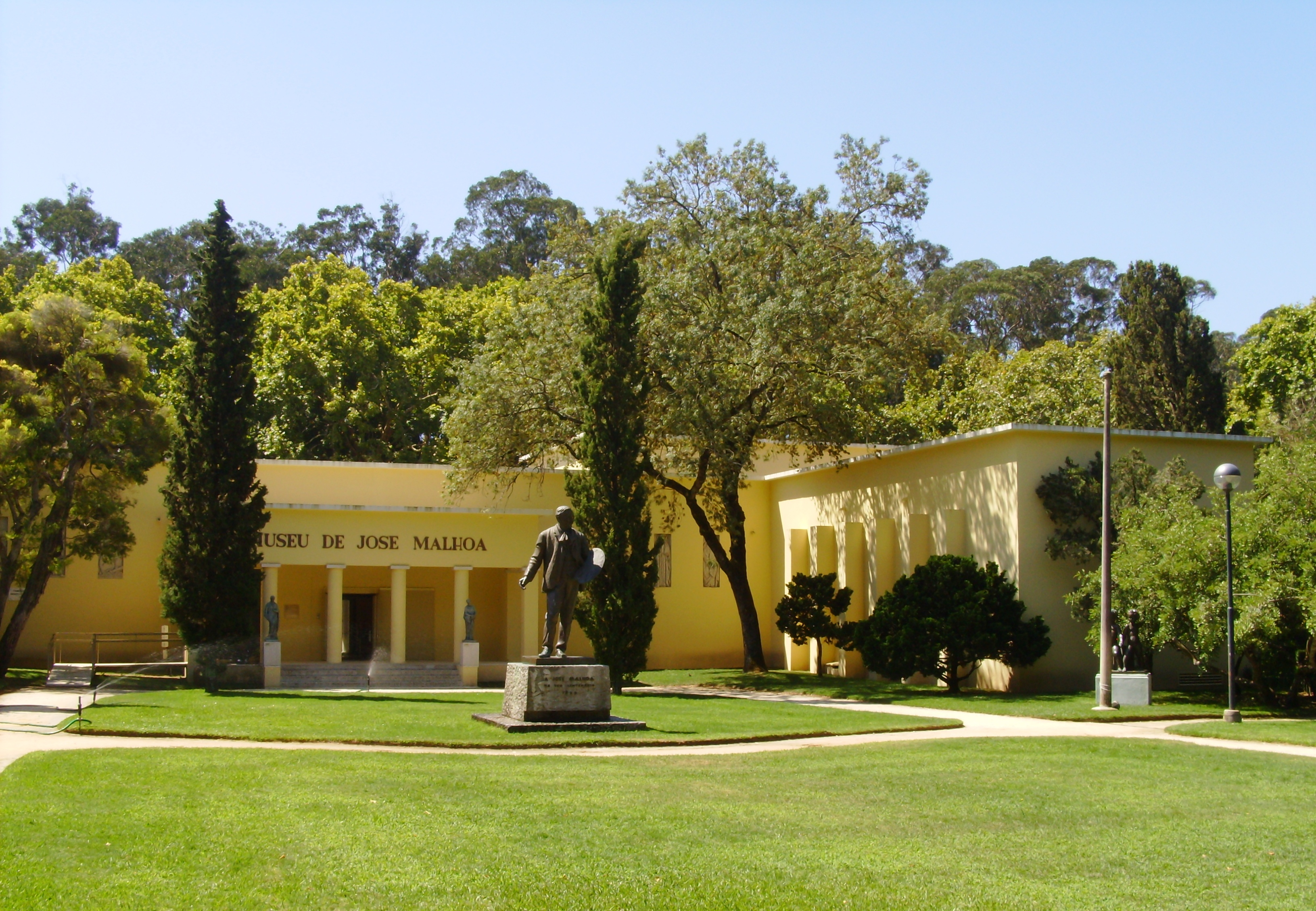 Museu de José Malhoa, Parque D. Carlos I, Caldas da Rainha, Distrito de Leiria, Portugal.